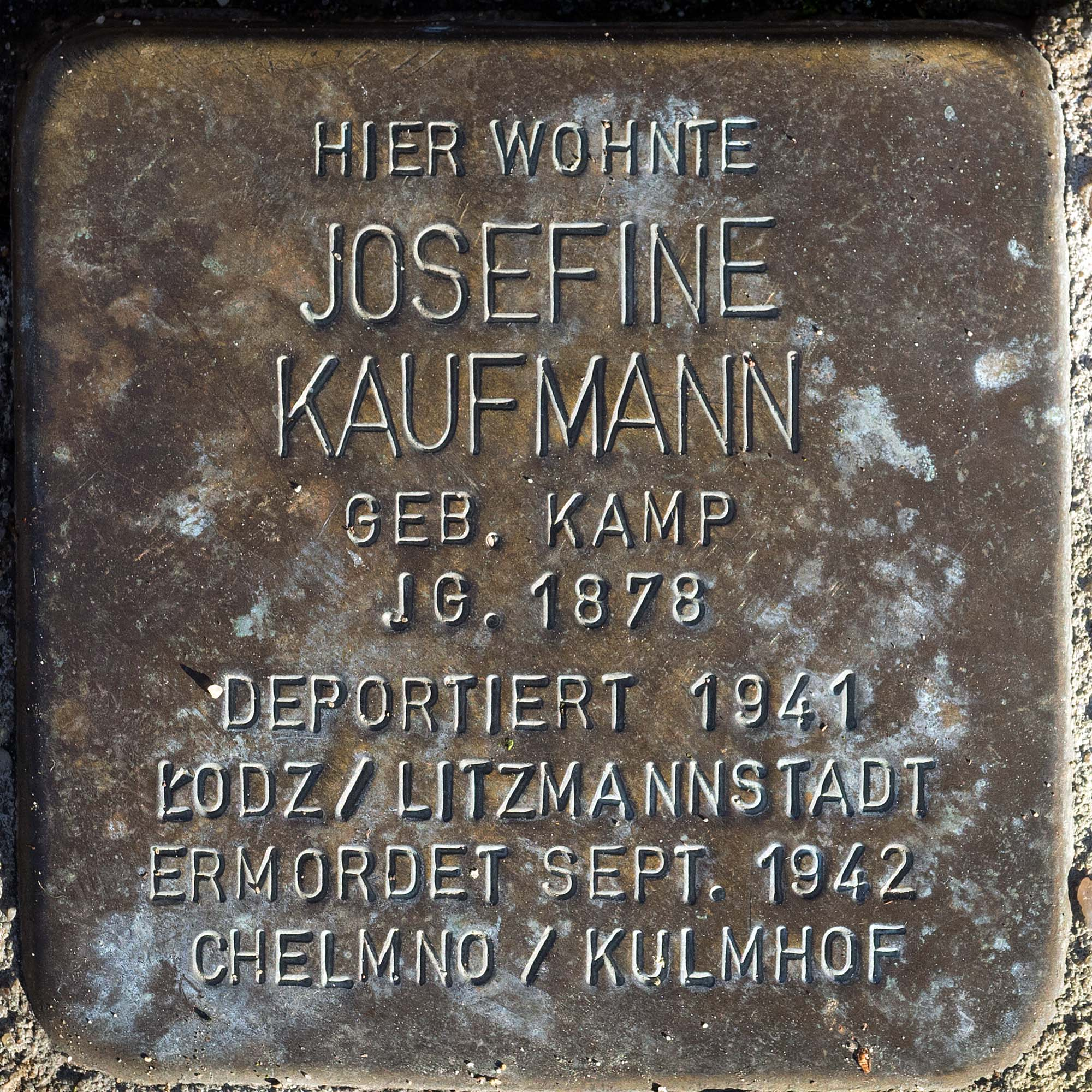 Stolperstein für Kaufmann Josefine